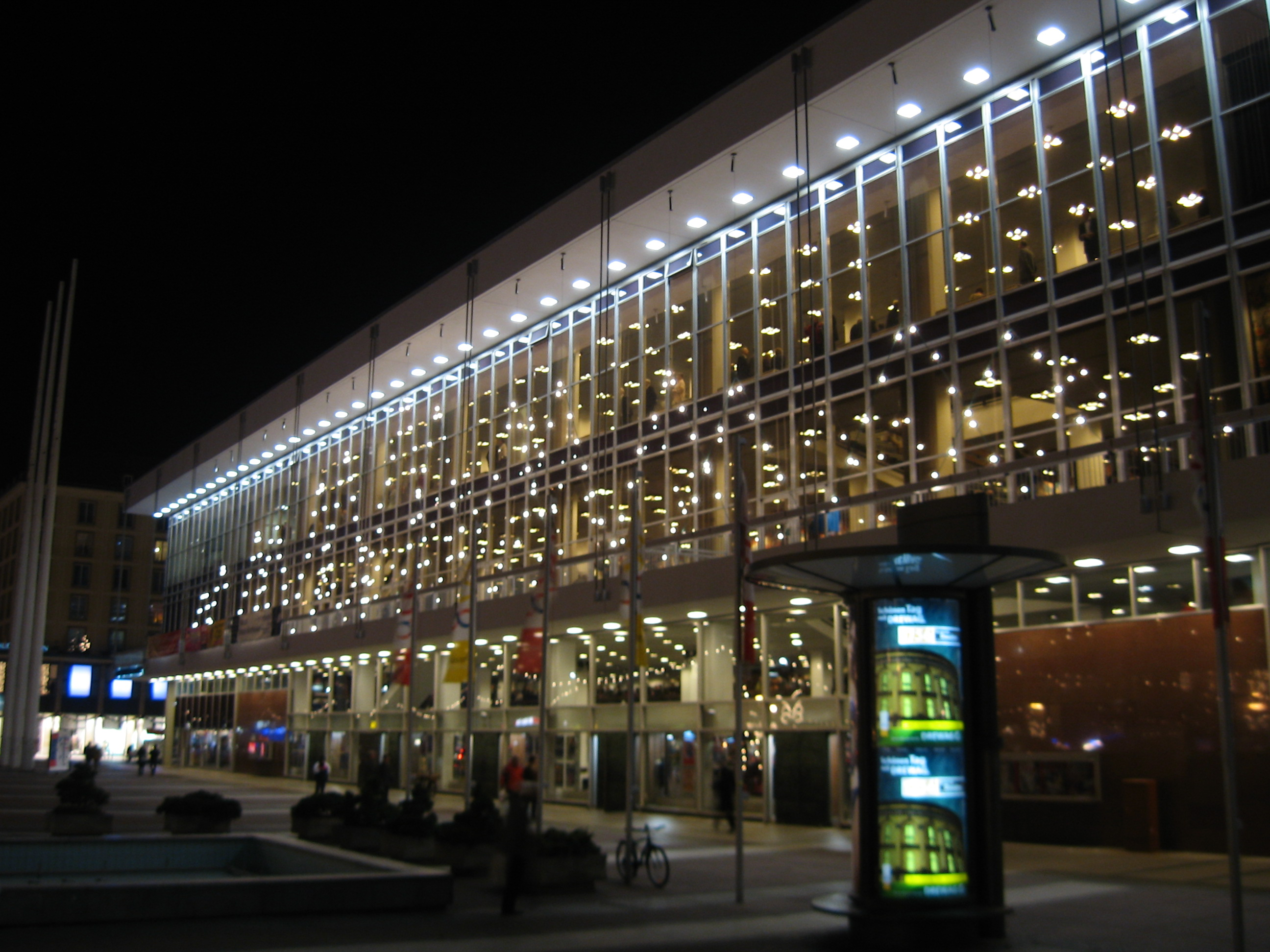 Kulturpalast Dresden bei Nacht, Front zur Wilsdruffer Straße